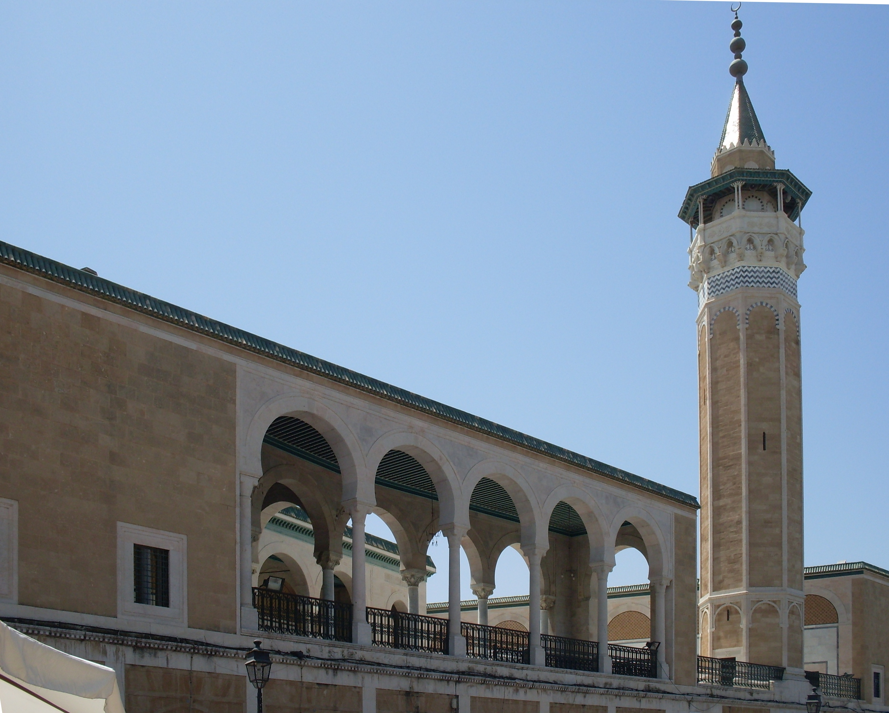 Médina de Tunis, Mosquée Youssef Saheb Ettabàa, Place Halfaouin